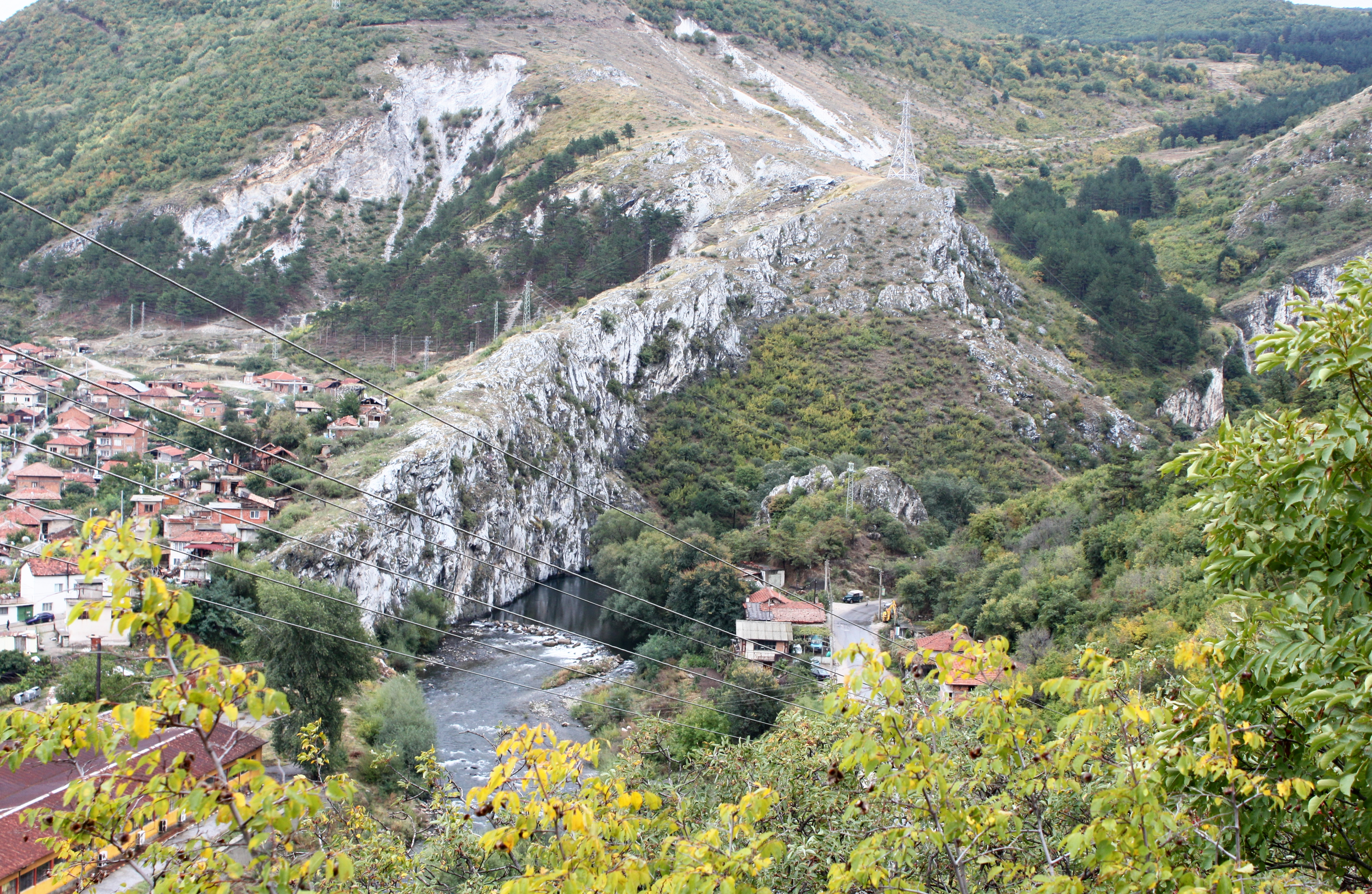 Kritschim, Bulgarien